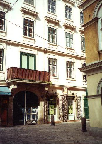 Judengasse 11, Wien